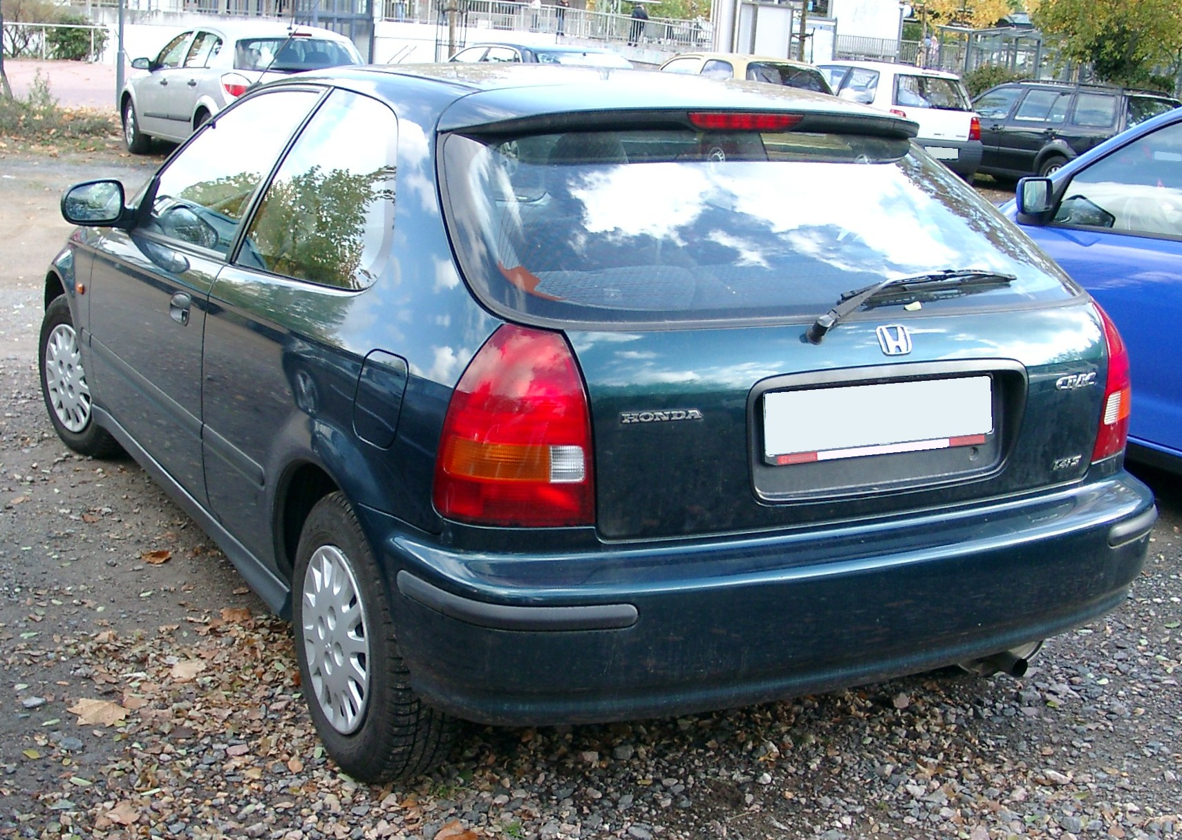 Honda Civic, 6. Generation